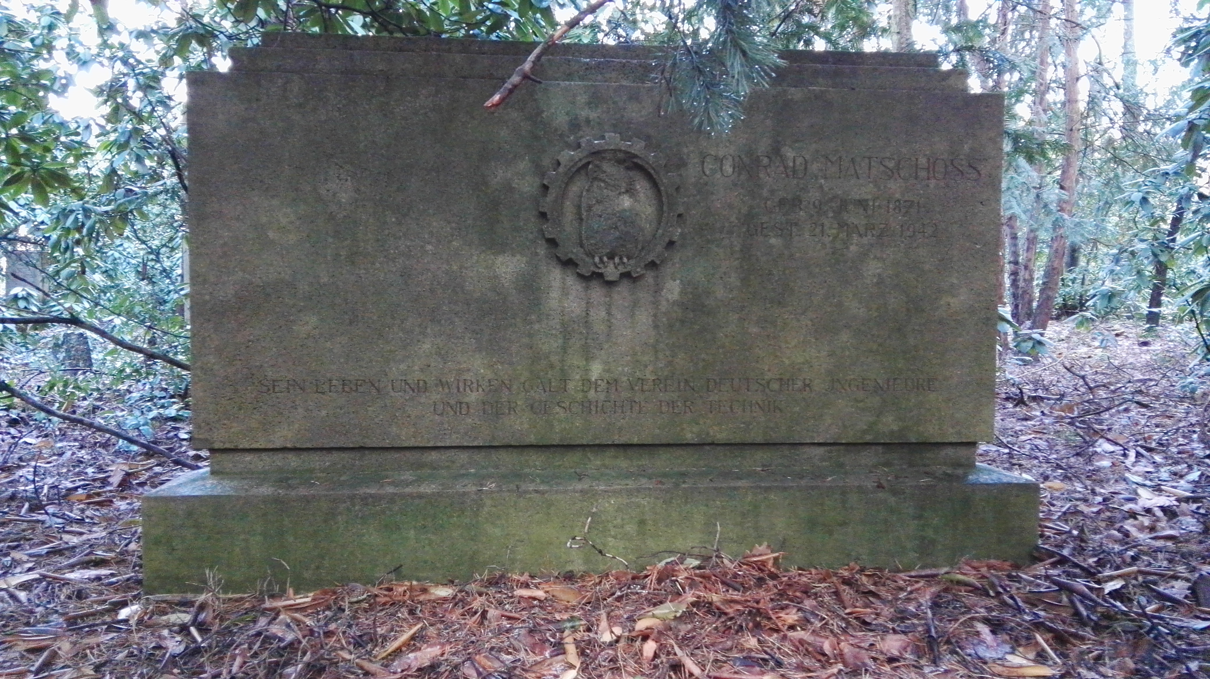 Grab von Conrad Matschoss auf dem Südwestkirchhof Stahnsdorf